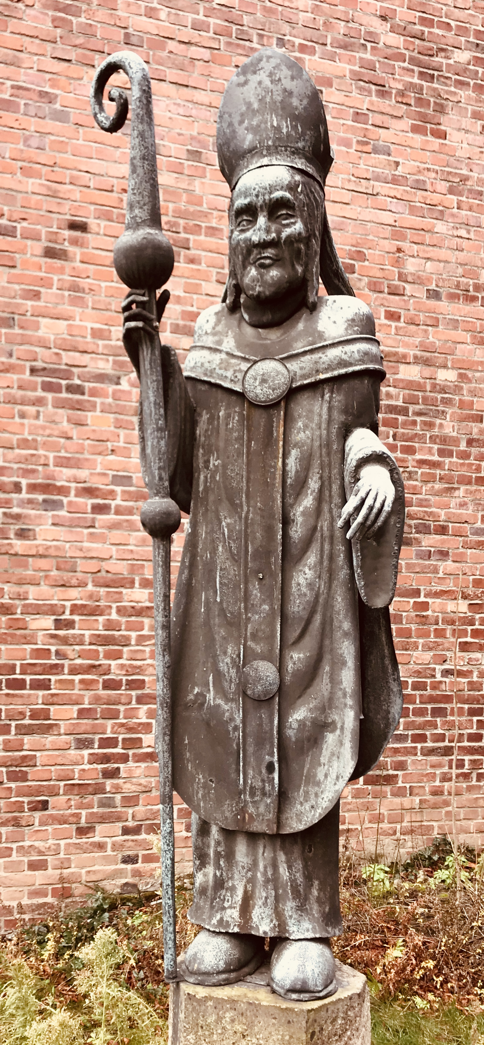 St. Engelbert (Köln-Riehl): Hl. Bischof Engelbert. In Kupfer getriebene Figur von Hans Rheindorf (1932). Ursprünglich im Chor aufgestellt. Heute im Pfarrgarten.